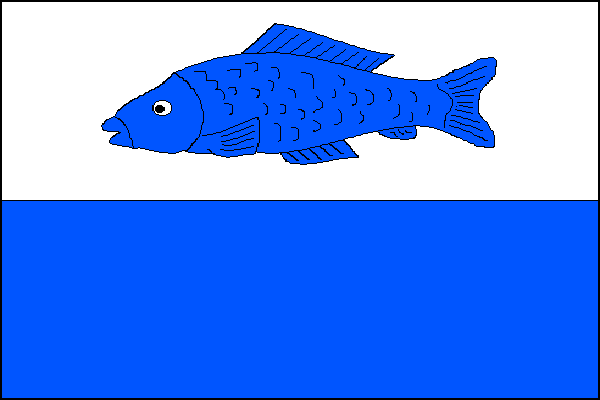 Vlajka,Hevlín , okres Znojmo